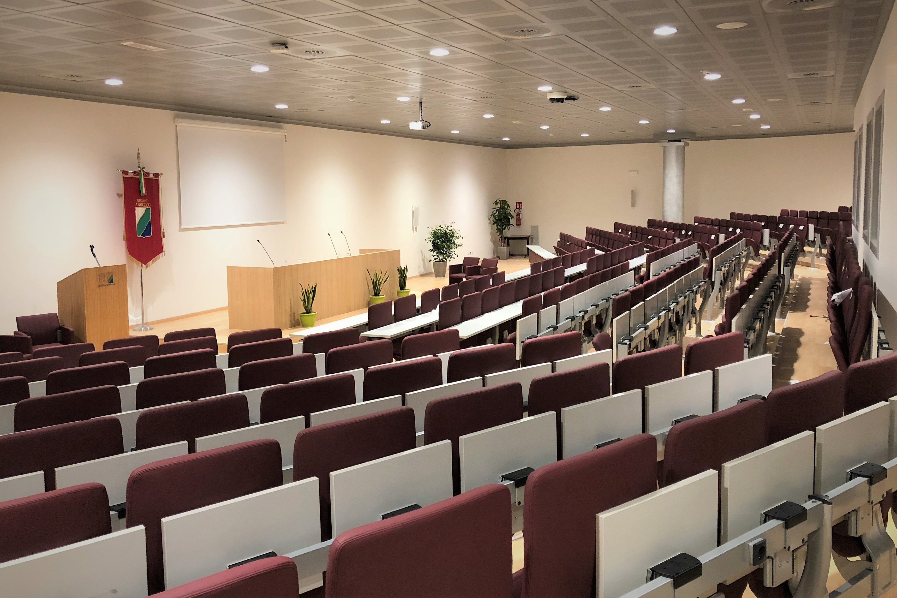 Palazzo dell'Emiciclo. Sala ipogea